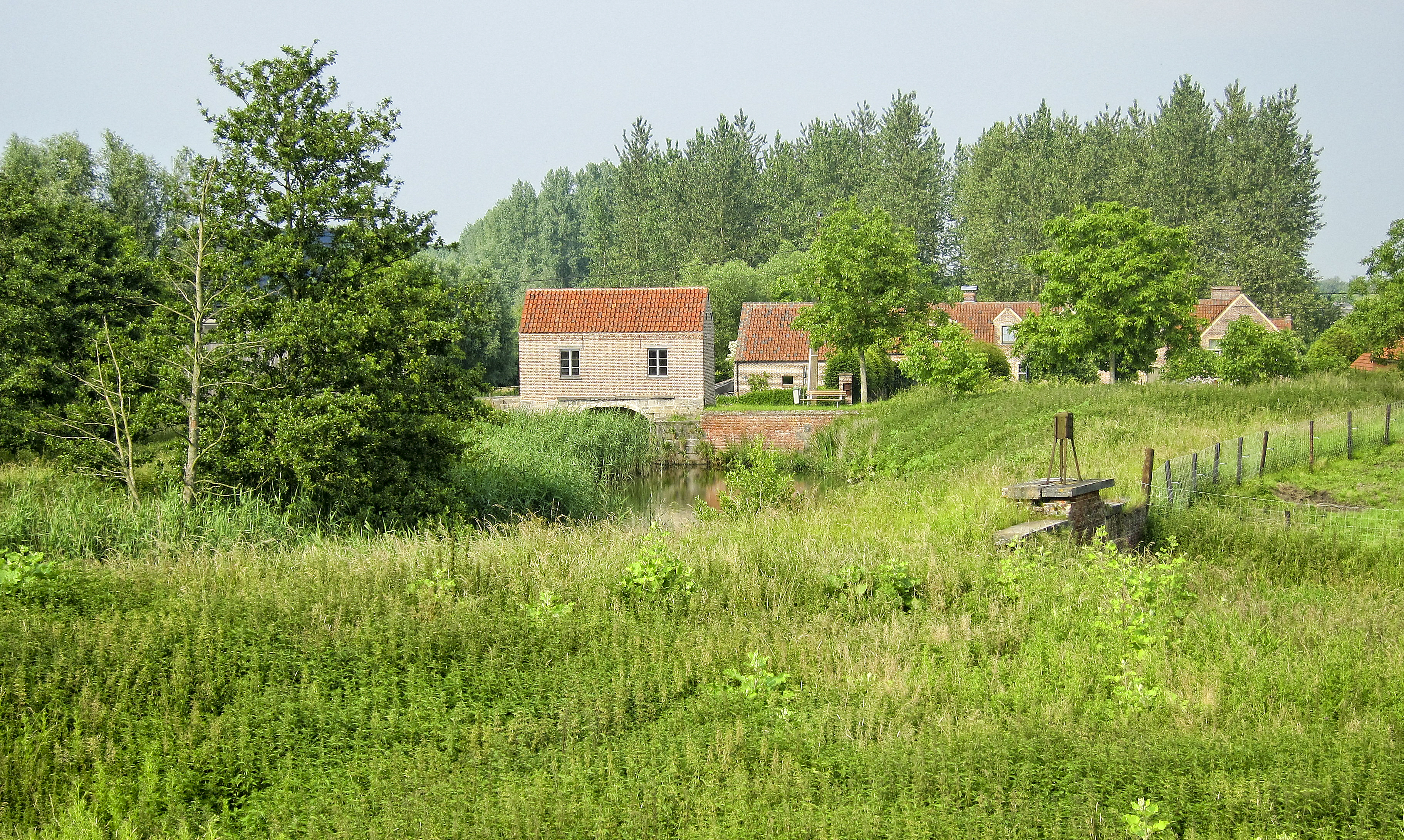 Het Riekend Ruspunt te Berlare, een museum over de handel tussen stad en platteland van mest en drijfmest met de Berlaar op de voorgrond